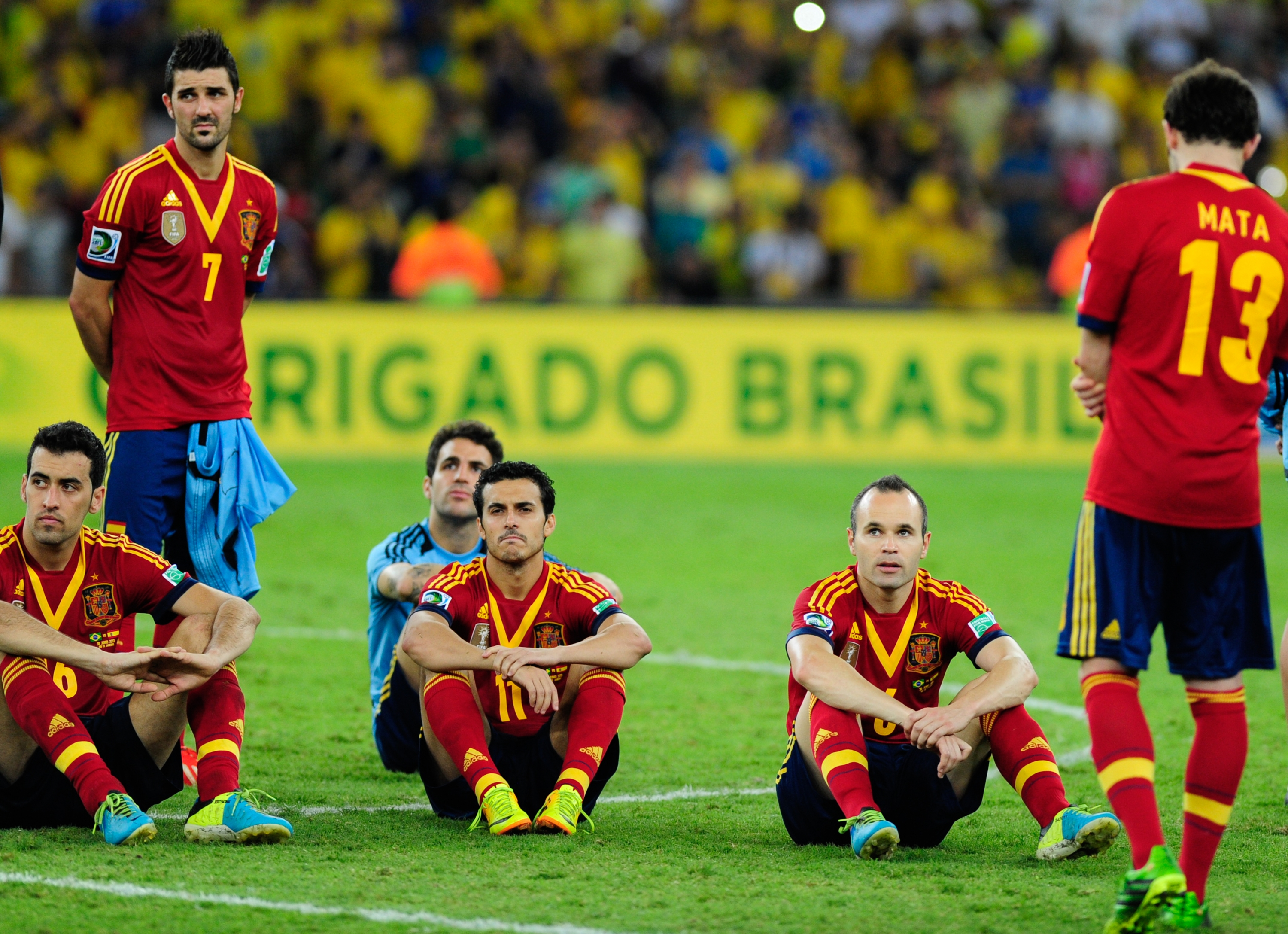 No Estádio do Maracanã, Brasil e Espanha disputam a taça da Copa das Confederações de 2013.